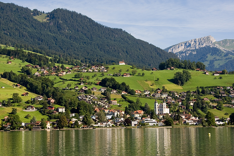 Sarnersee mit Blick nach Sarnen